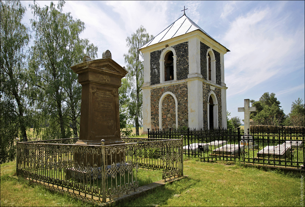 Струбніца. Надмагілле і званіца